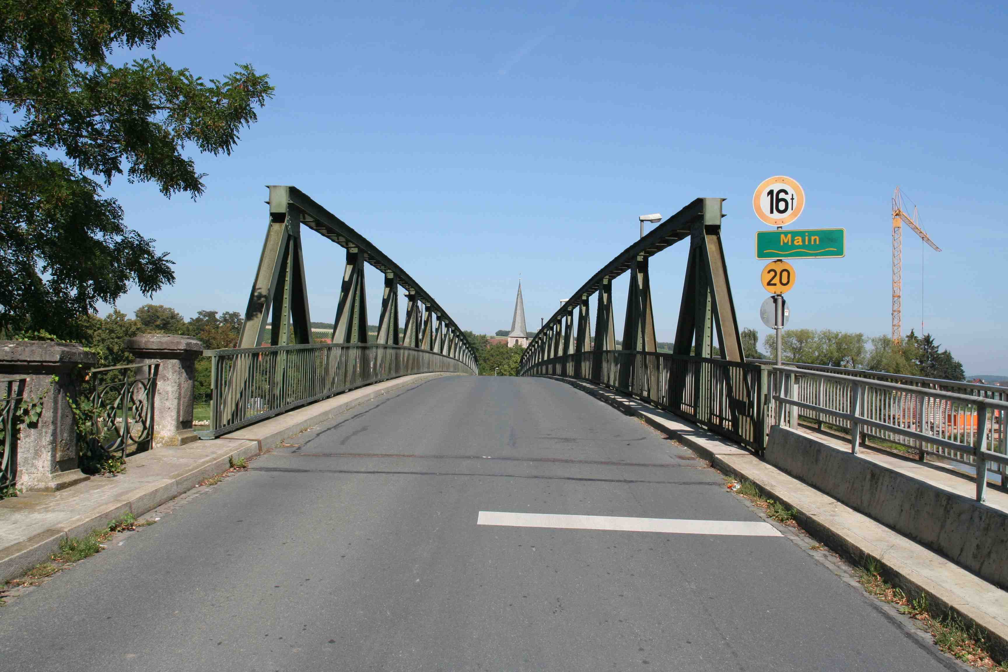 Mainbrücke Segnitz, Landkreis Kitzingen, Unterfranken